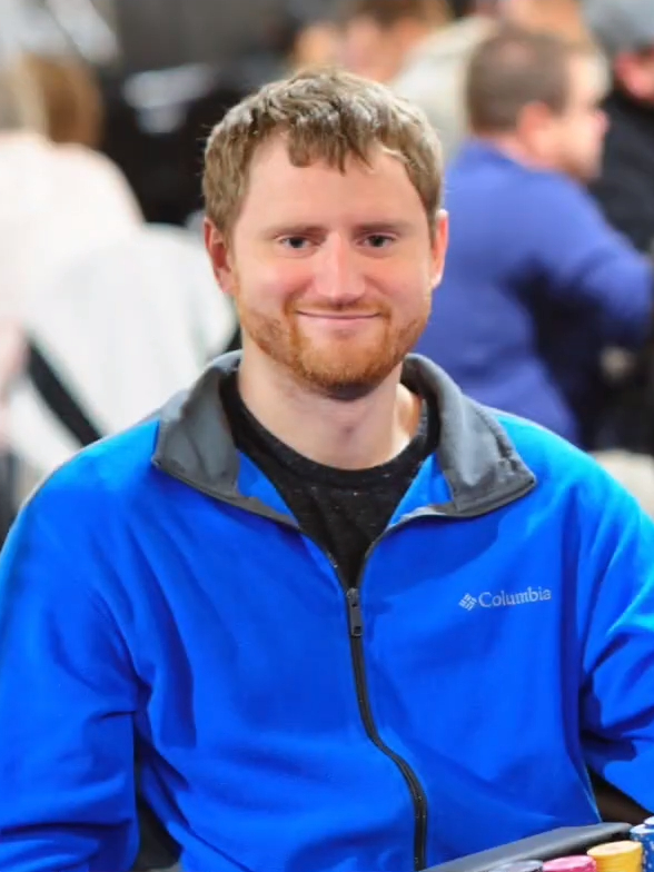 David Peters bei der WPT Montreal